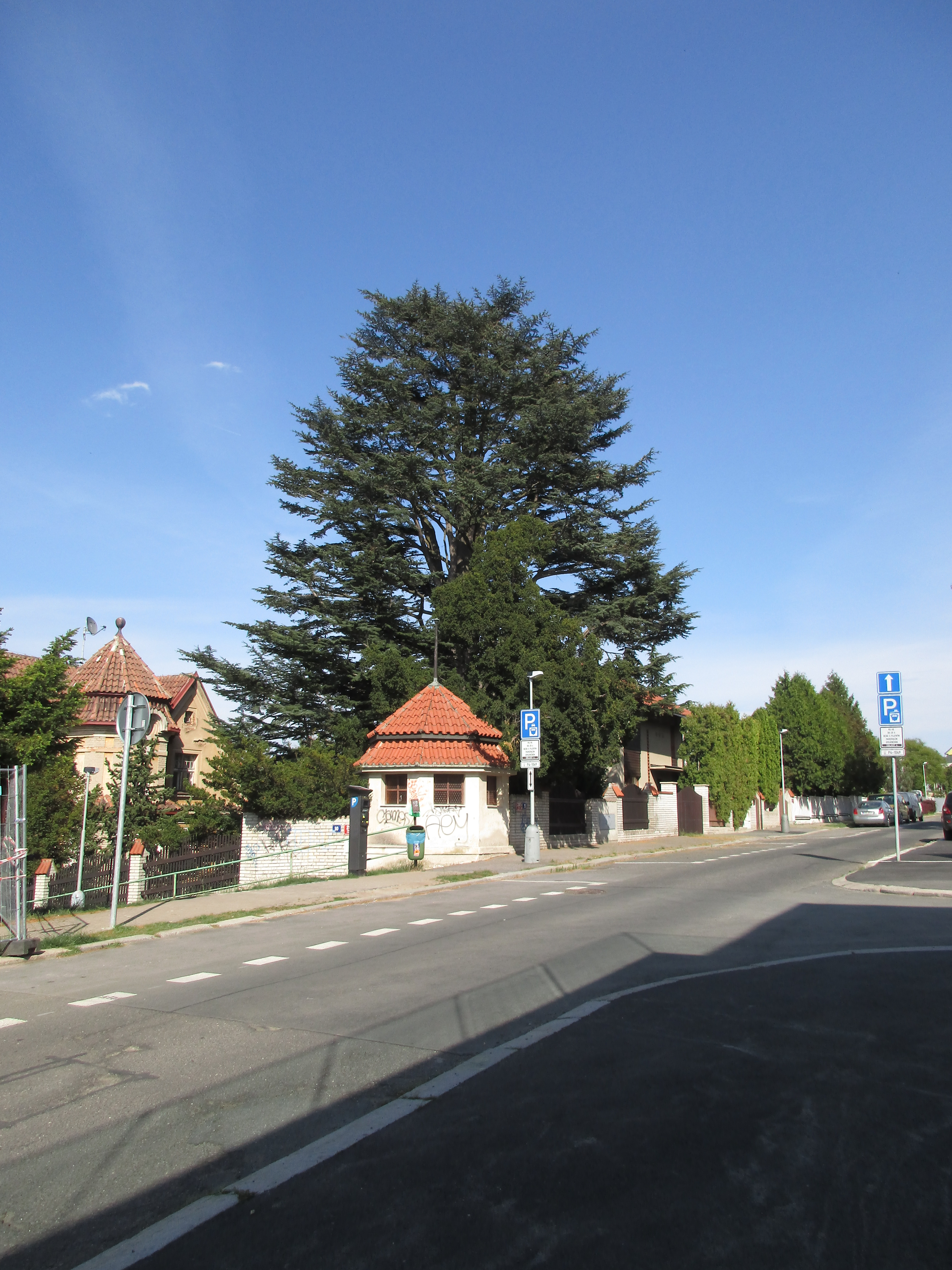 Cedr libanonský (Cedrus libani). Praha 4 - Braník, ulice U Dubu. Významný strom, evidenční číslo MHMP: 21, v databázi od roku 2013.